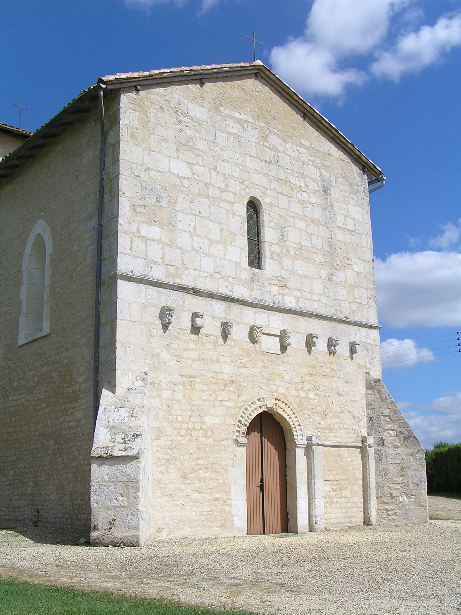 église de Lamérac, Charente, France